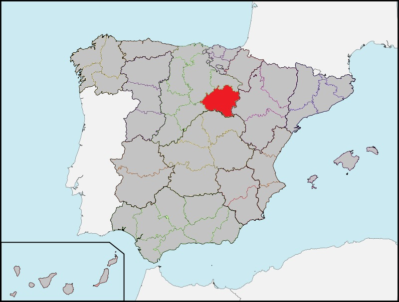 Ubicación de la provincia de Soria en la España de los años treinta